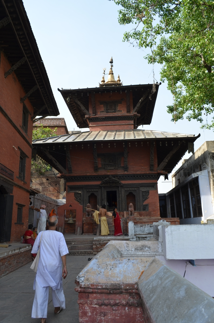 Nepali Temple exterior, Varanasi.